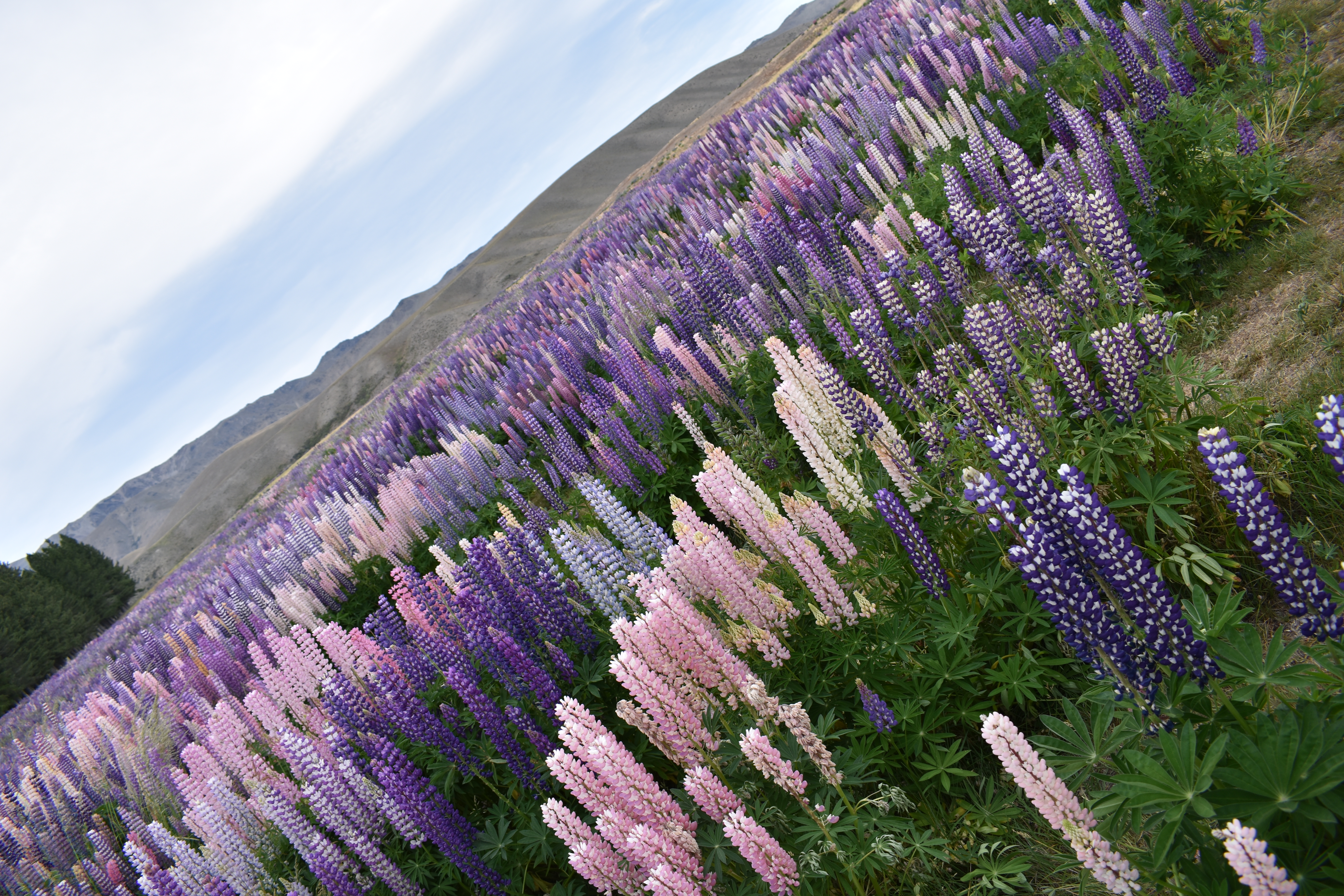 lupins near lake tekapo region